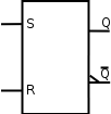 Description: Schéma d'une bascule RS